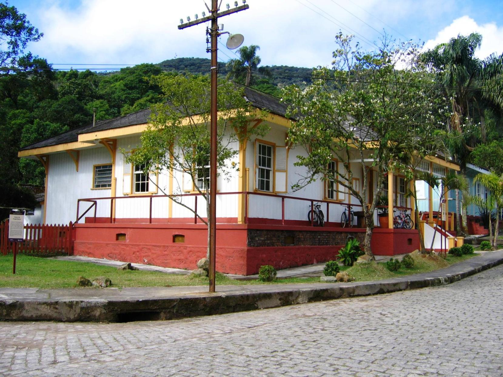 Casas de Engenheiro